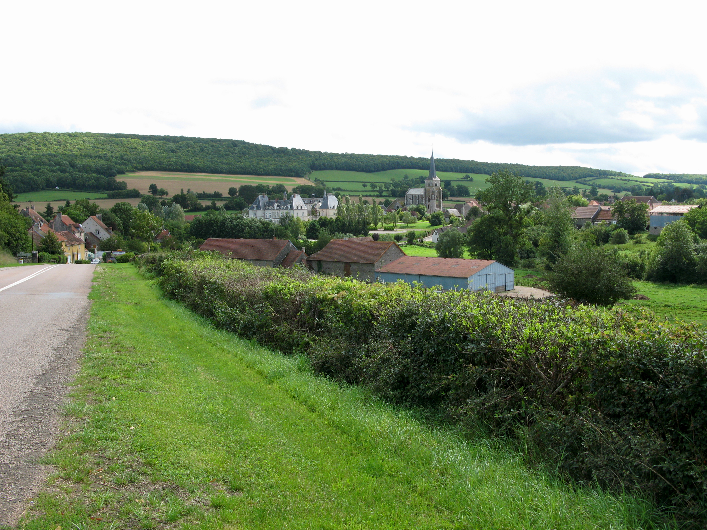 Sainte-Sabine (Côte-d'Or, France) - Vue sur le village, en arrivant par le Nord (Départementale D 970). . .